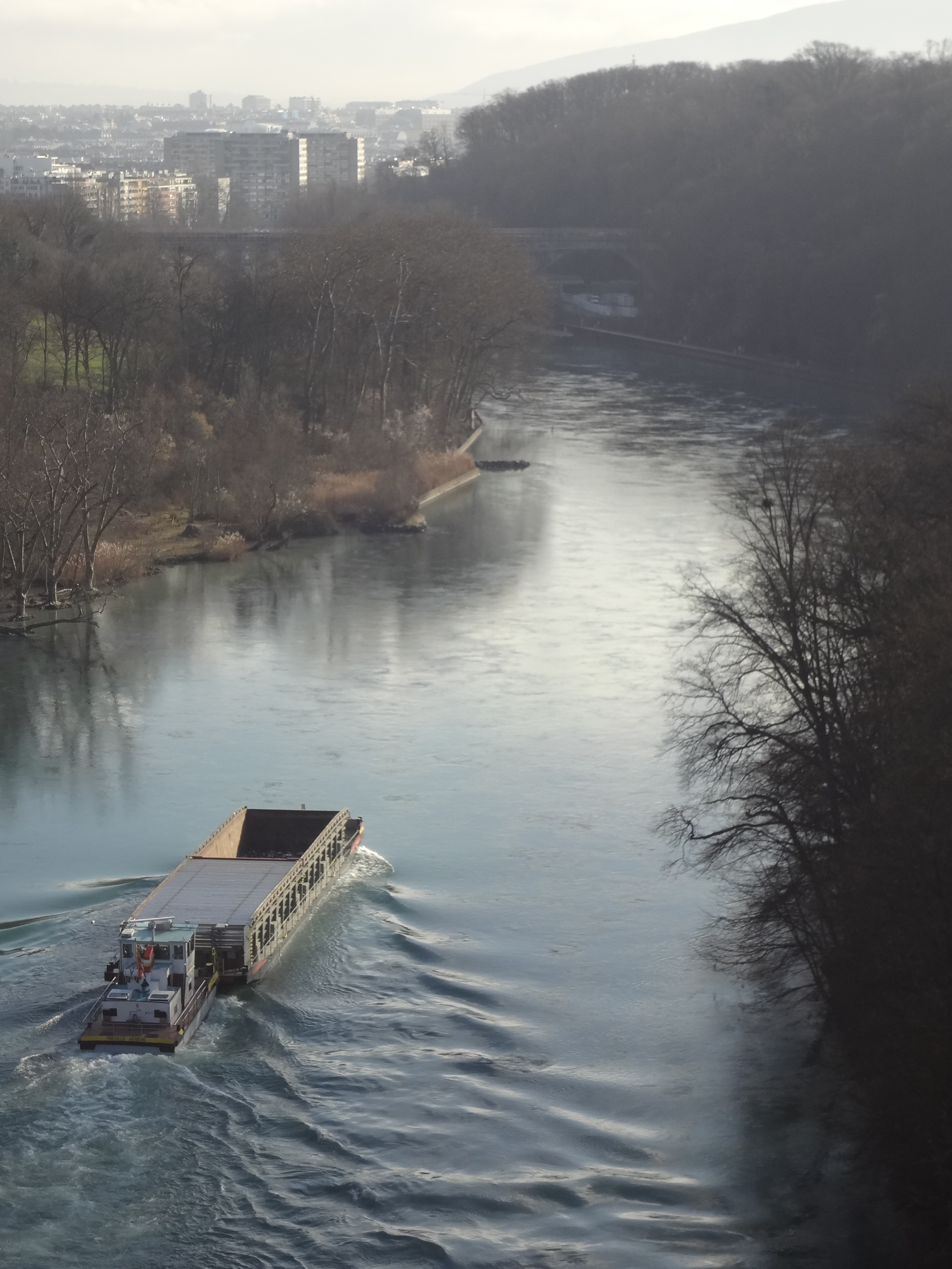 Barge de transport des déchets urbains genevois entre La Jonction et Les Cheneviers, ici à vide et remontant le Rhône, sous le Pont Butin.